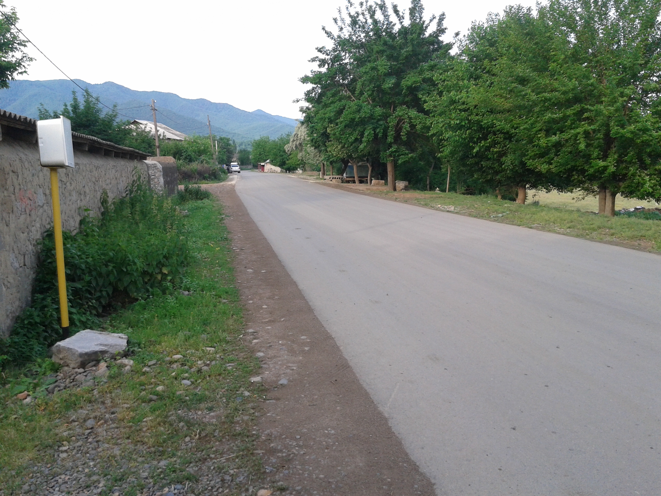 Sadakhlo, Georgia